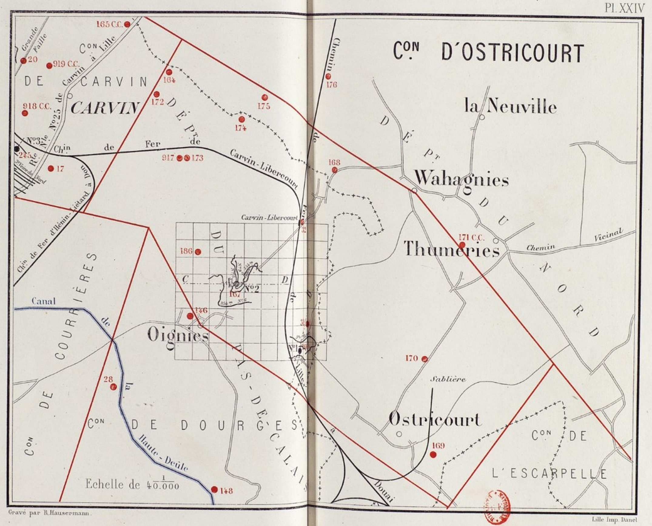 État des travaux en 1880 de la Compagnie des mines d'Ostricourt.